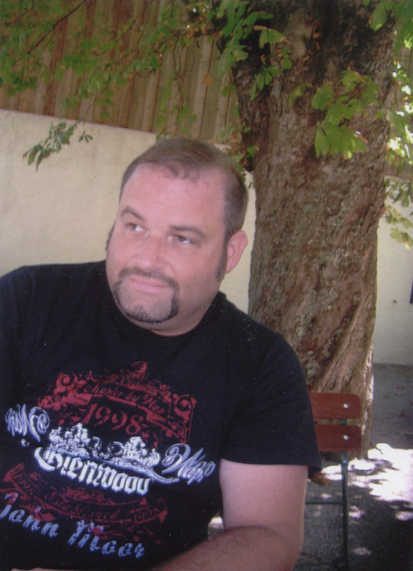 Elmar Oberegger im Biergarten des Gasthofes "Zur Post" in Seebruck/Chiemsee